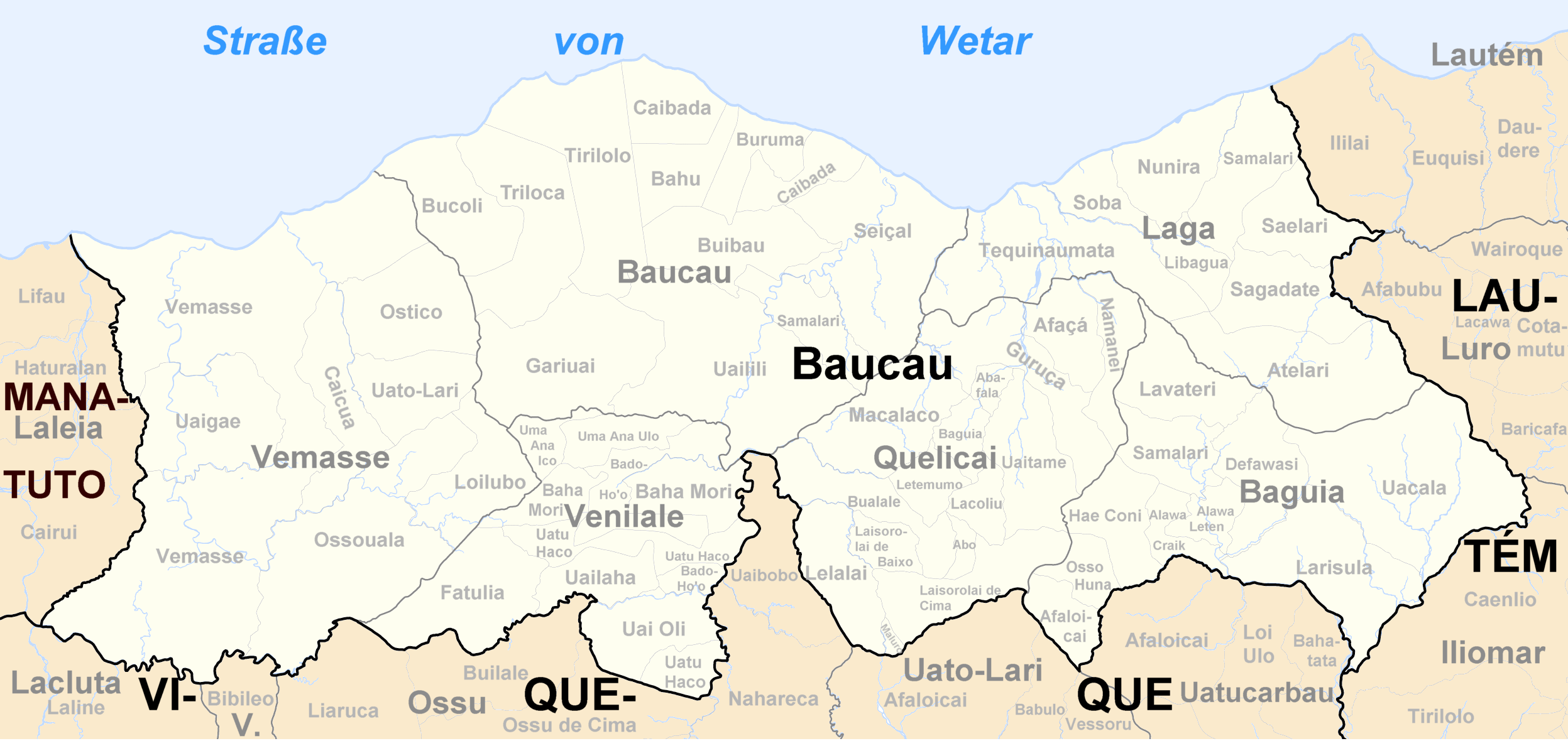 Sucos des Distrikts Baucau/Osttimor nach der Neustrukturierung 2004